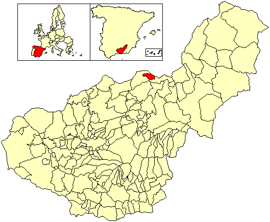 Situación del término municipal de Alicún de Ortega respecto a la provincia de Granada, en España.